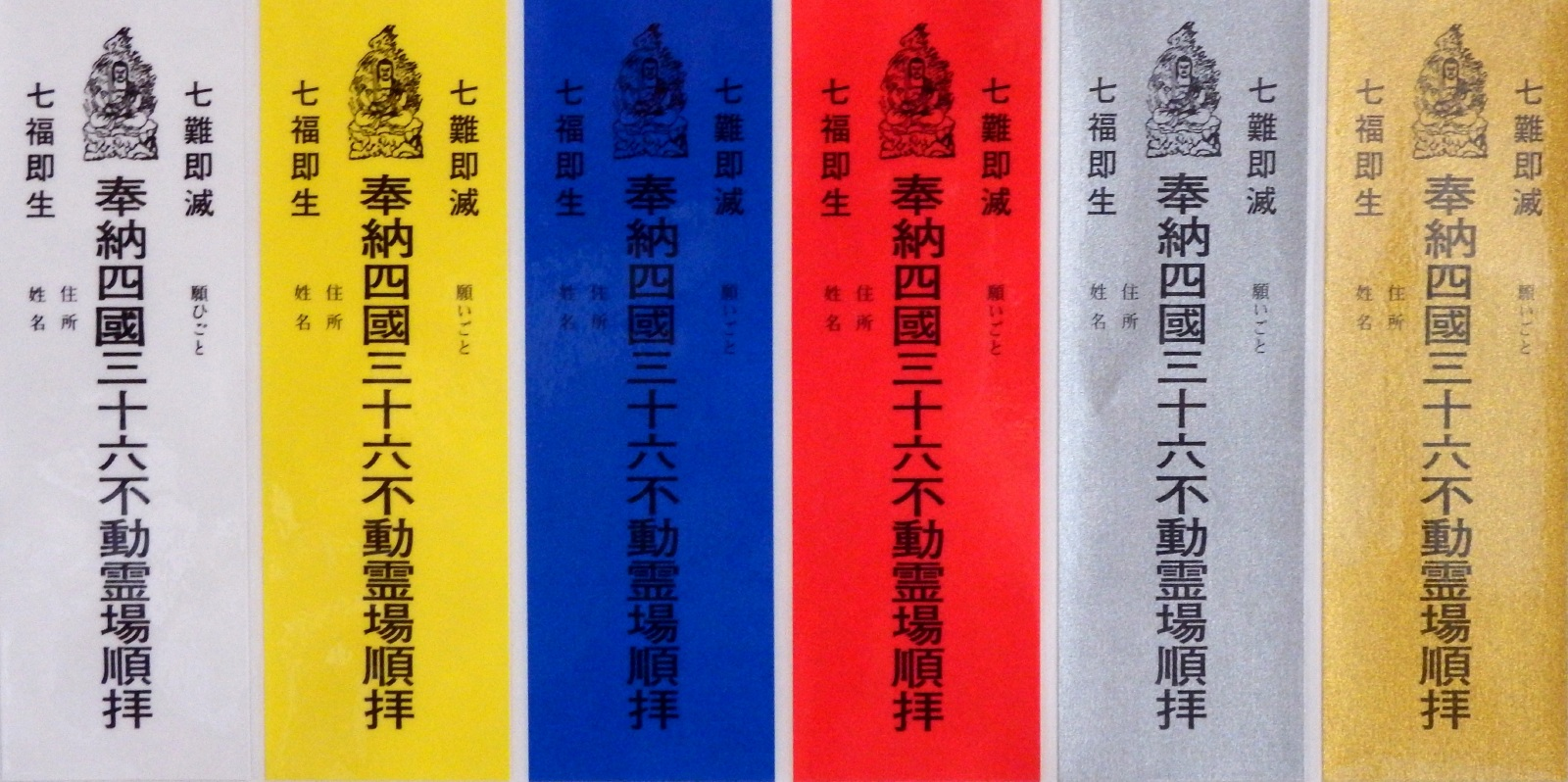 四国三十六不働霊場の納札